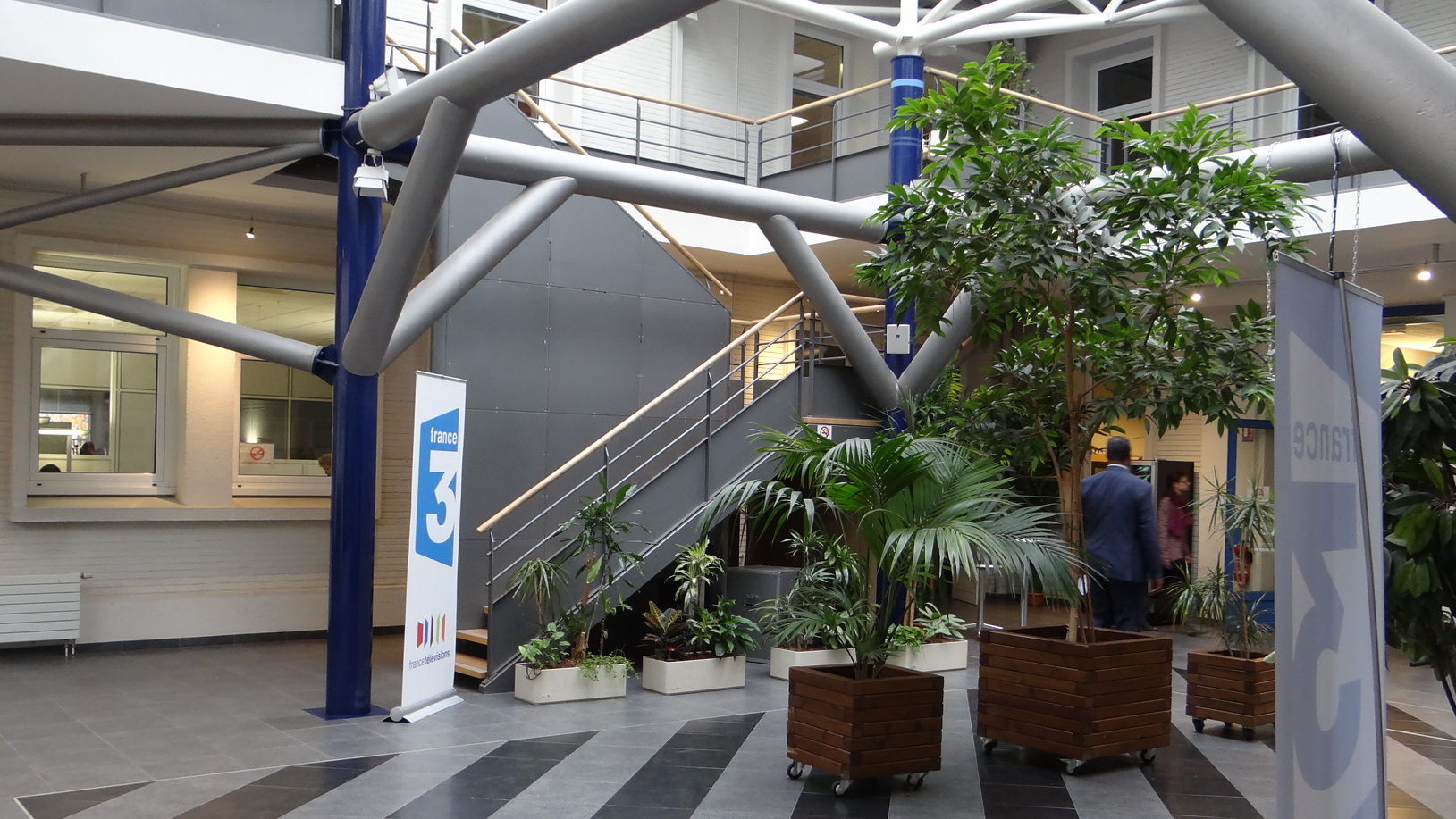 FR3 Nord Pas-de-Calais Patio